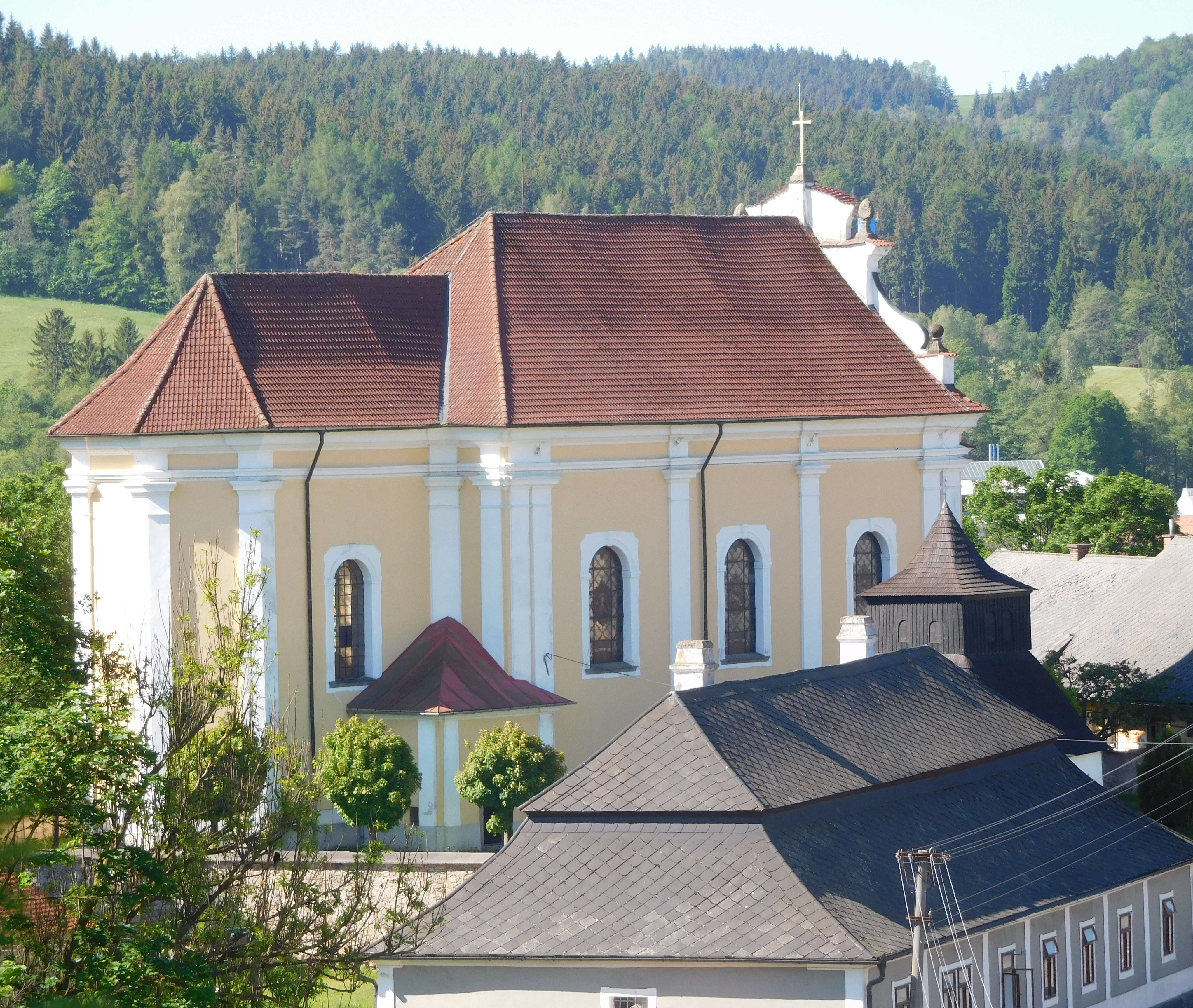 Foceno od hřbitova